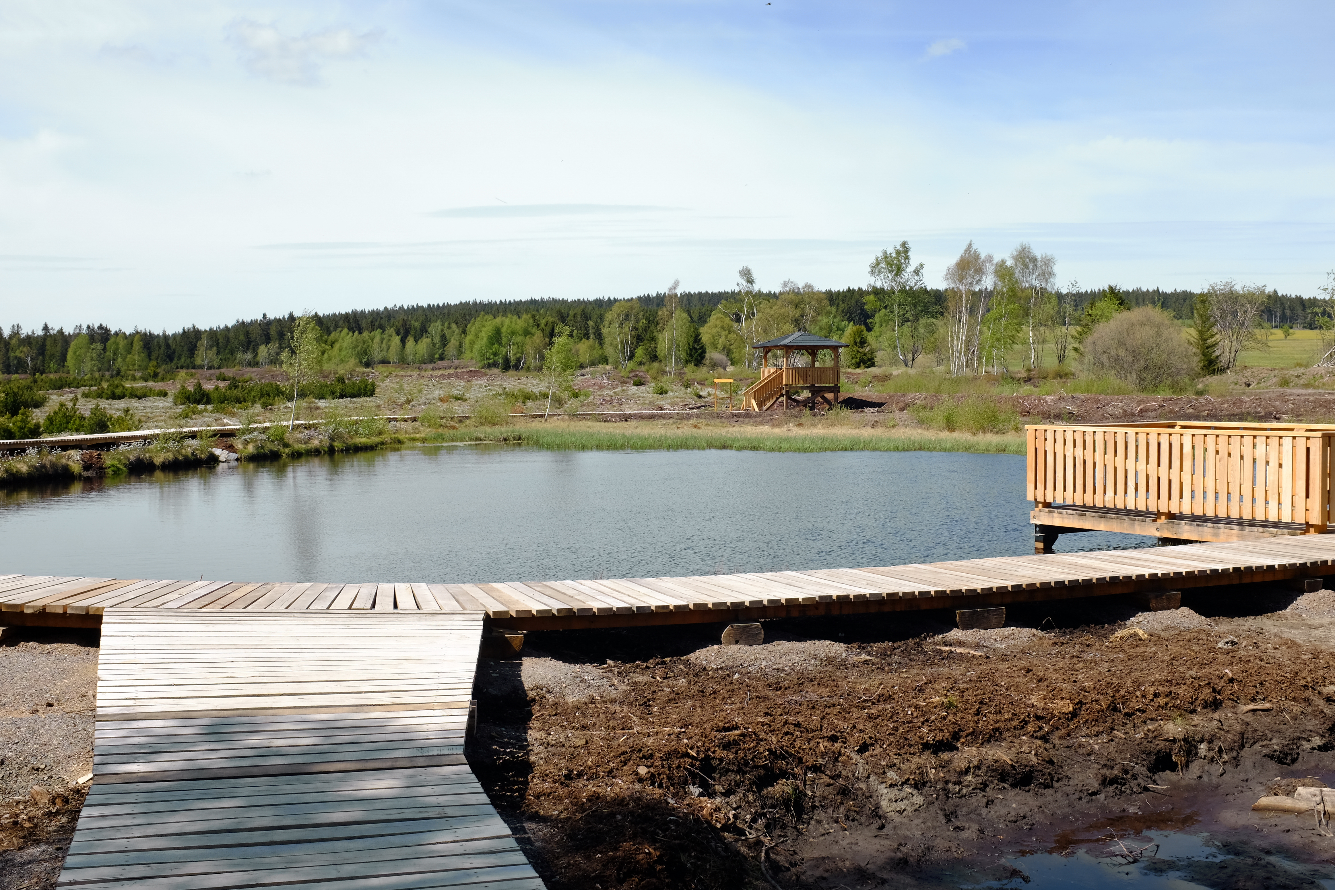 Přírodní památka Pernink, Pernink, Krušné hory, okres Karlovy Vary